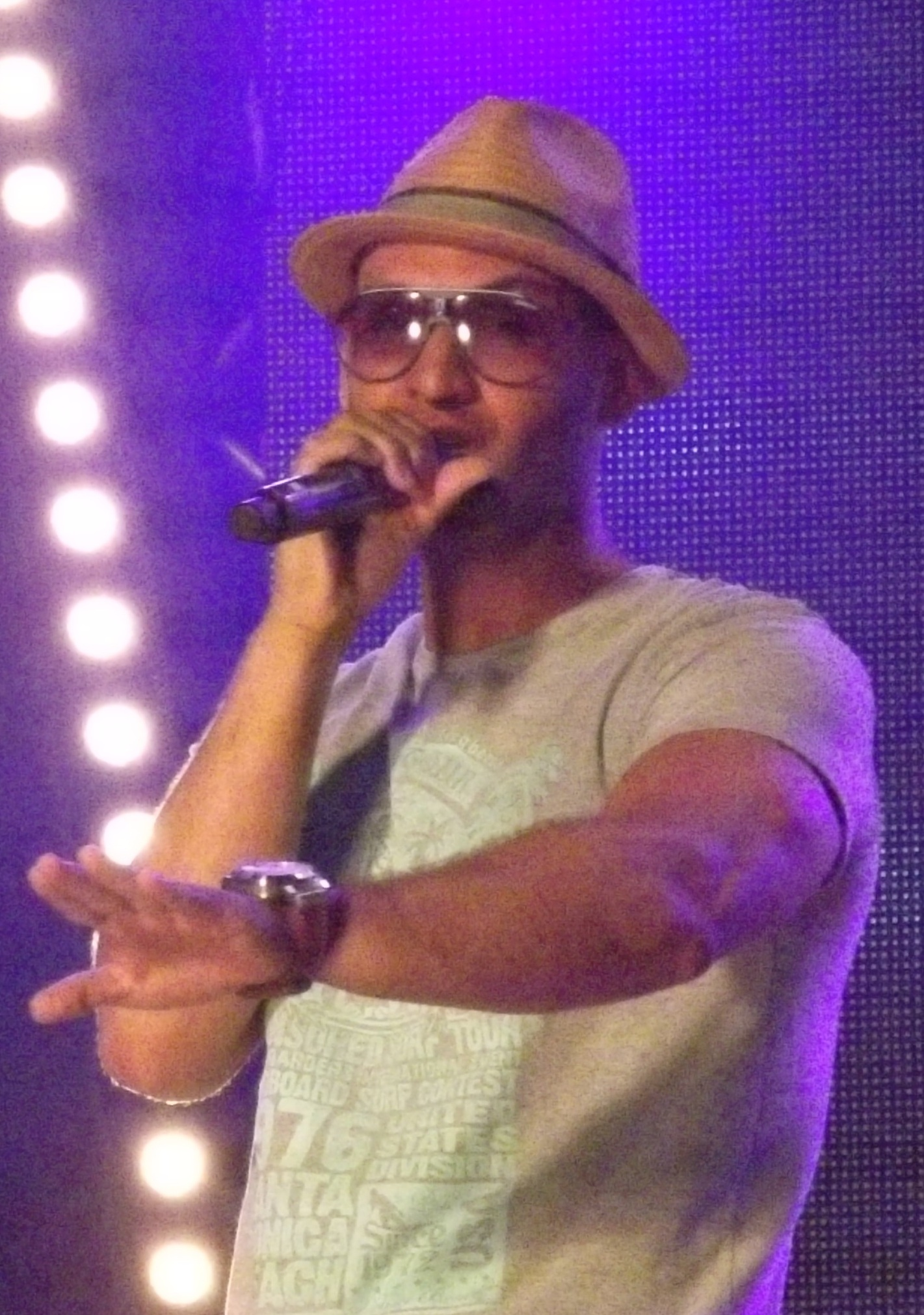 Brahim (Attaeb) tijdens de uitreiking van de Radio 2 Zomerhit-award op 17 augustus 2012 in Middelkerke-Westende